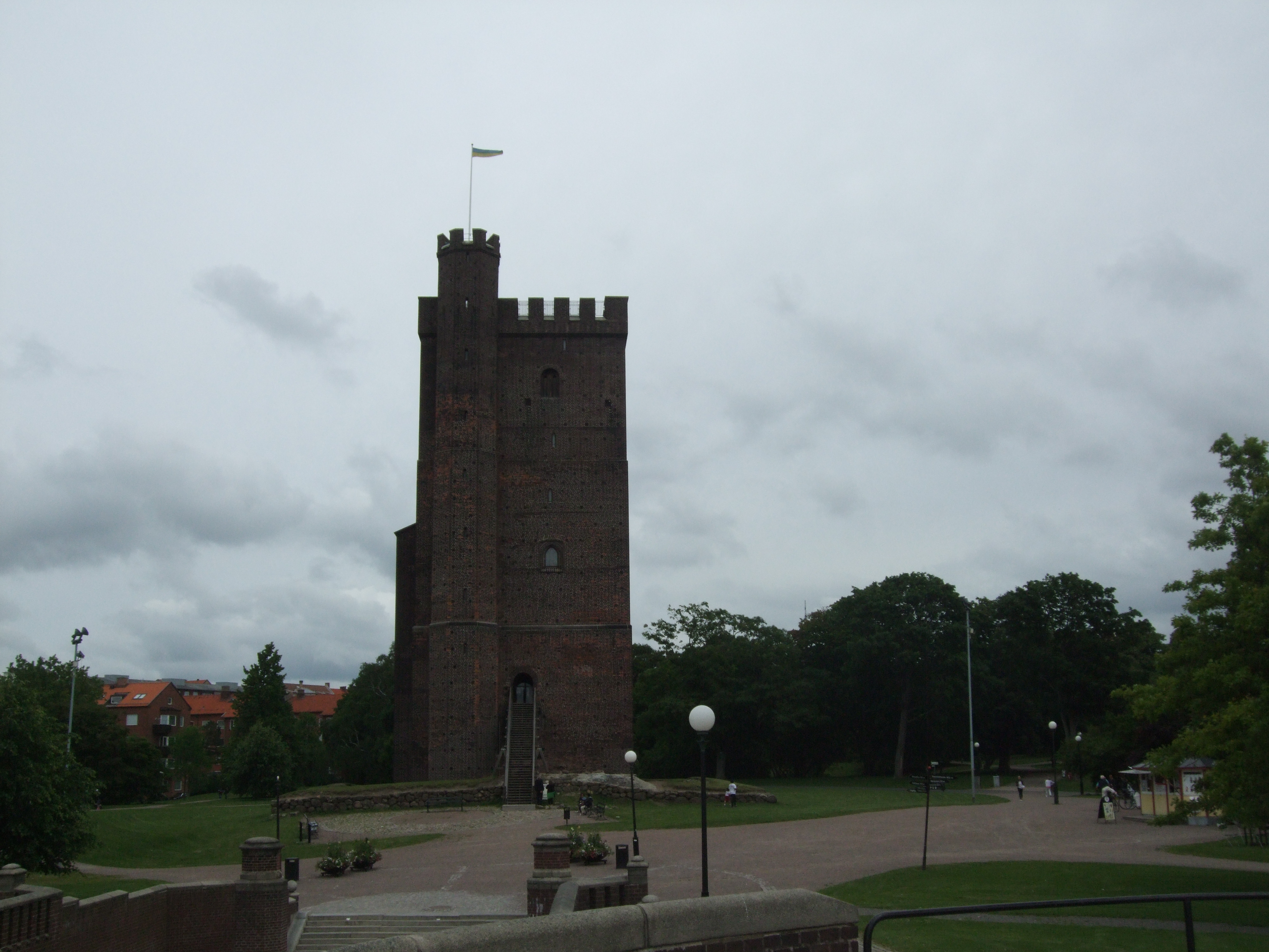 Шернан